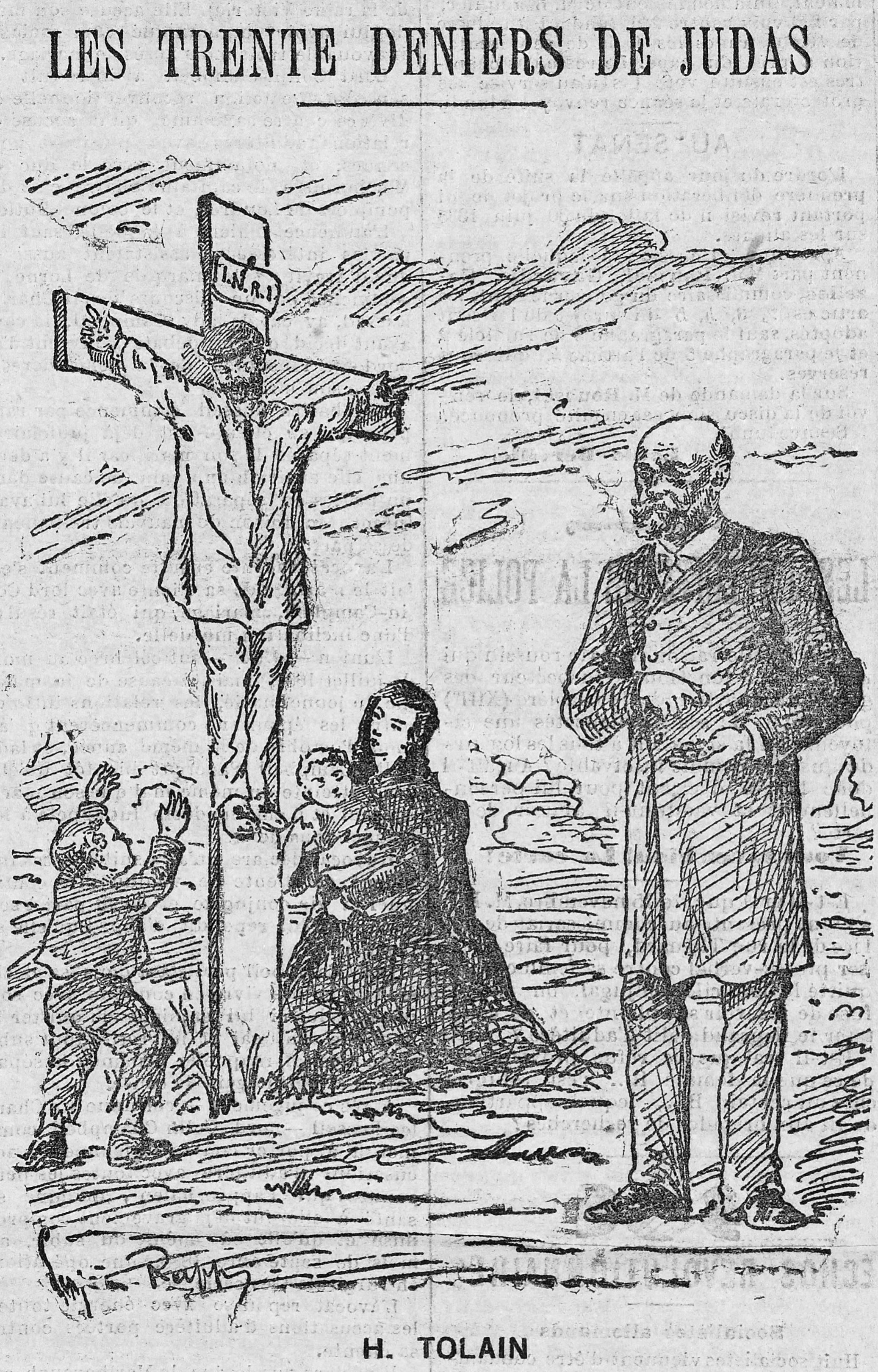 Caricature de Tolain en Judas.